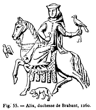 Adélaïde de Bourgogne (dite Aleyde de Brabant) 1260